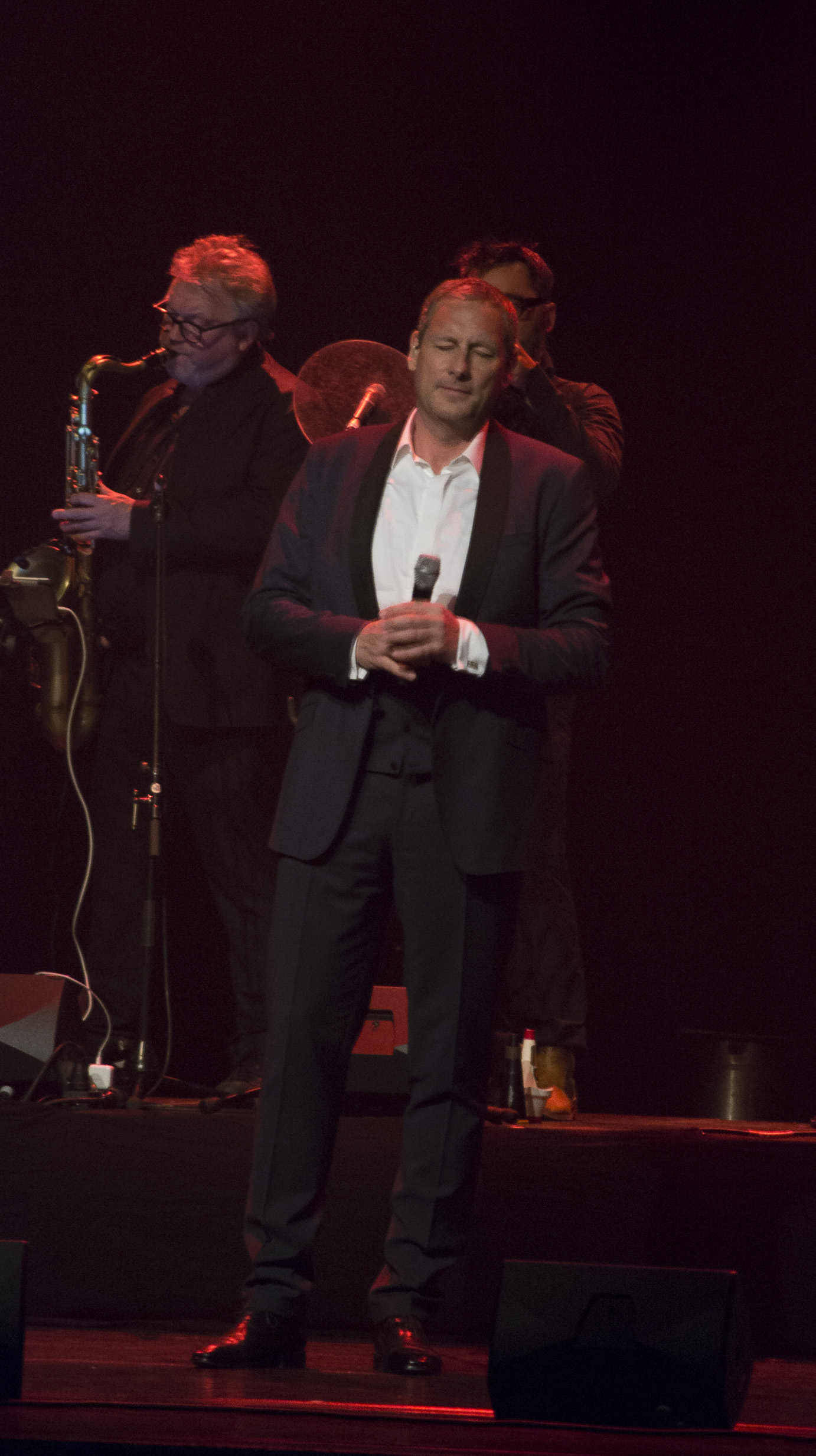 Gert Verhulst tijdens 'Pappie loop toch niet zo snel' in het CC Lanaken op 14 april 2017.